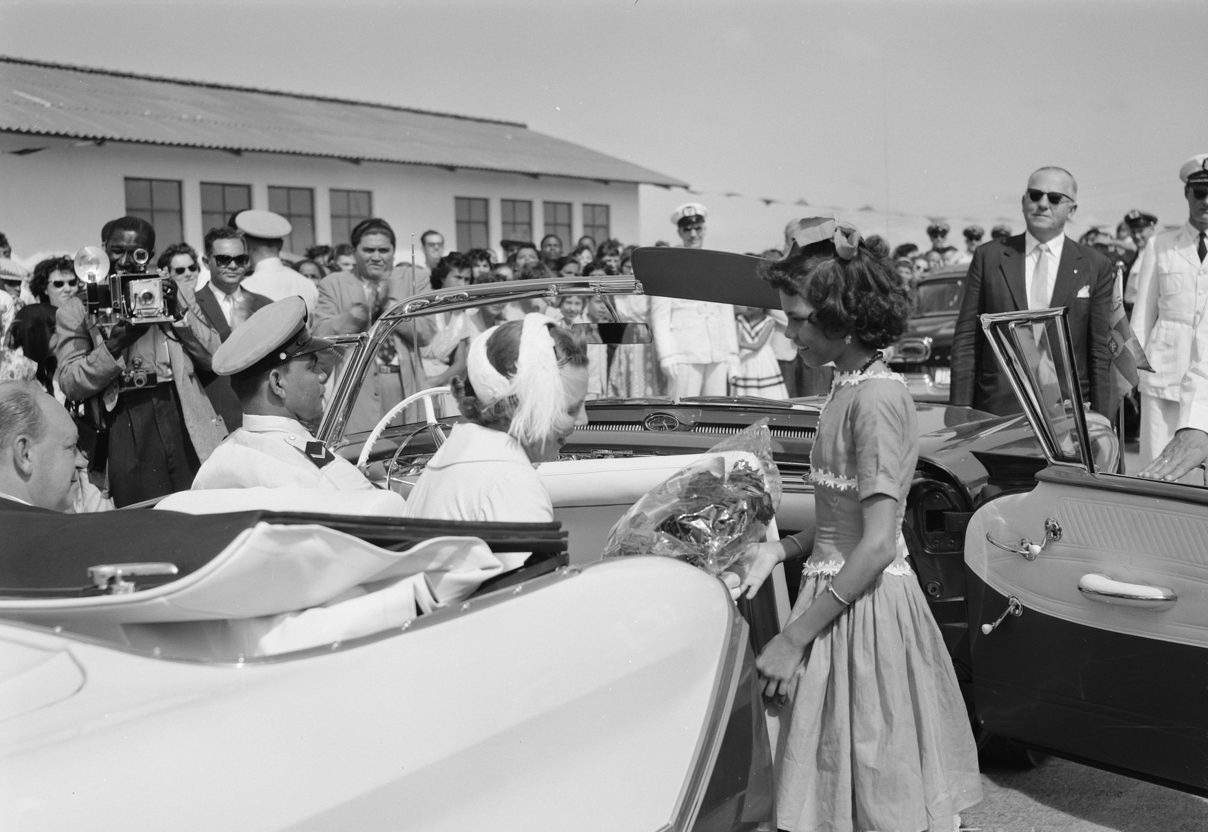 Collectie / Archief : Fotocollectie Anefo Reportage / Serie : [ onbekend ] Beschrijving : Prinses Beatrix op bezoek op Aruba. Een meisje biedt bloemen aan te Santa Cruz Datum : 17 februari 1958 Locatie : Aruba, Santa Cruz Trefwoorden : BLOEMEN, MEISJE, bezoeken Persoonsnaam : Beatrix, prinses Fotograaf : Bonke, Jan / Anefo Auteursrechthebbende : Nationaal Archief Materiaalsoort : Negatief (zwart/wit) Nummer archiefinventaris : bekijk toegang 2.24.01.03 Bestanddeelnummer : 909-3487